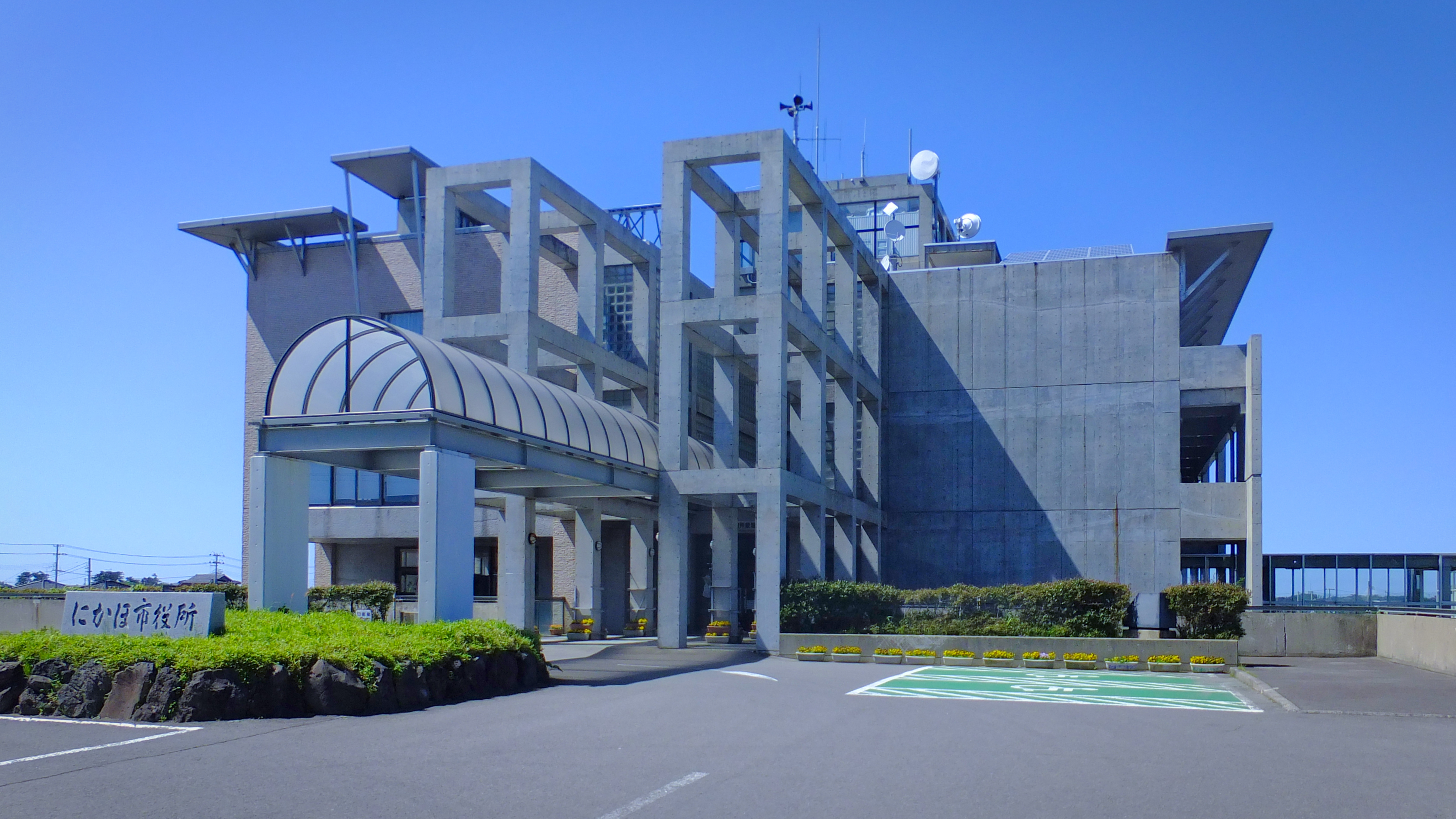 にかほ市役所本庁舎(にかほ市象潟町)